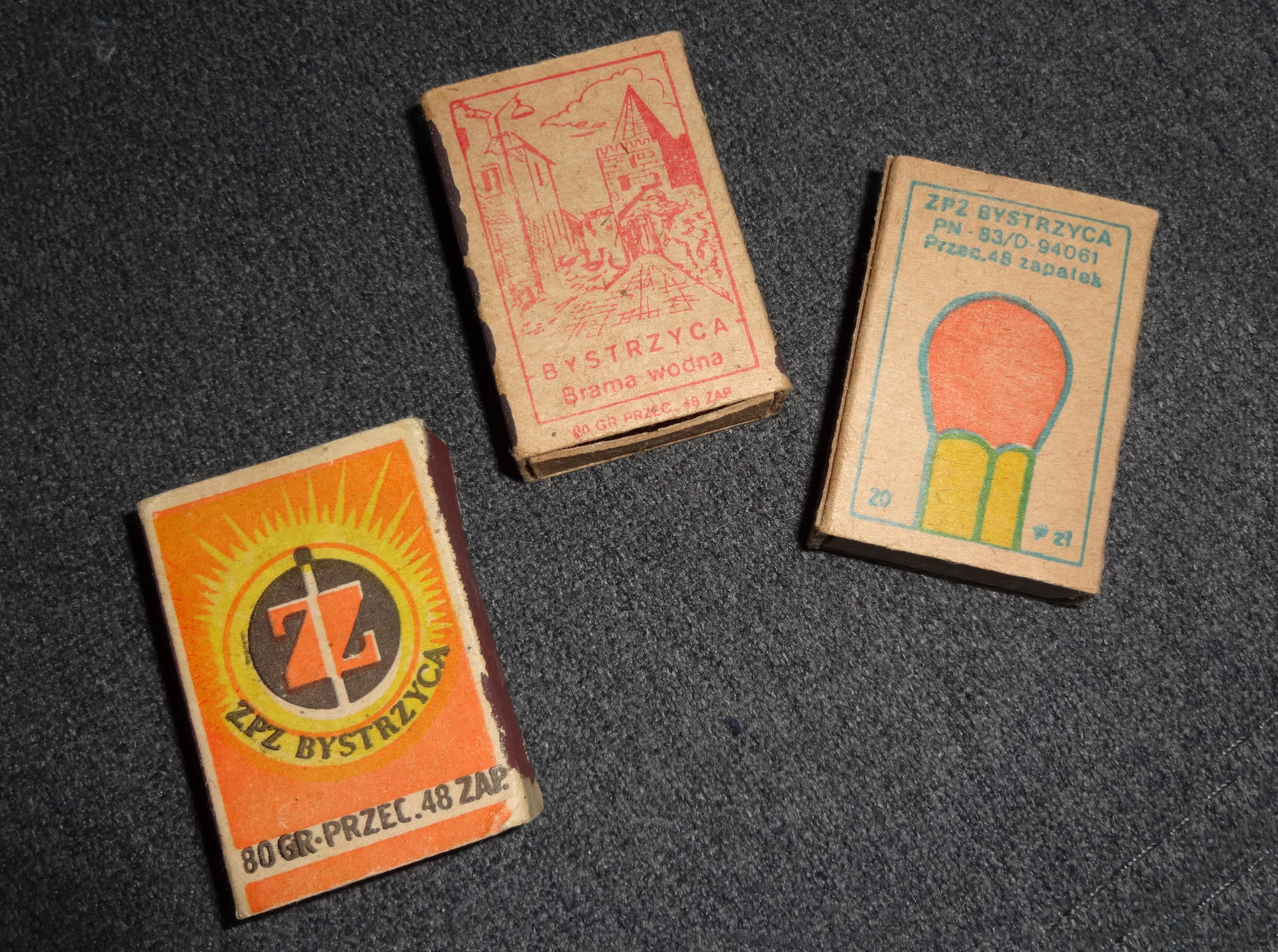 Zapałki ZPZ Bystrzyca z czasów PRL